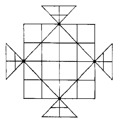 中文（台灣）: 土家族跳棋